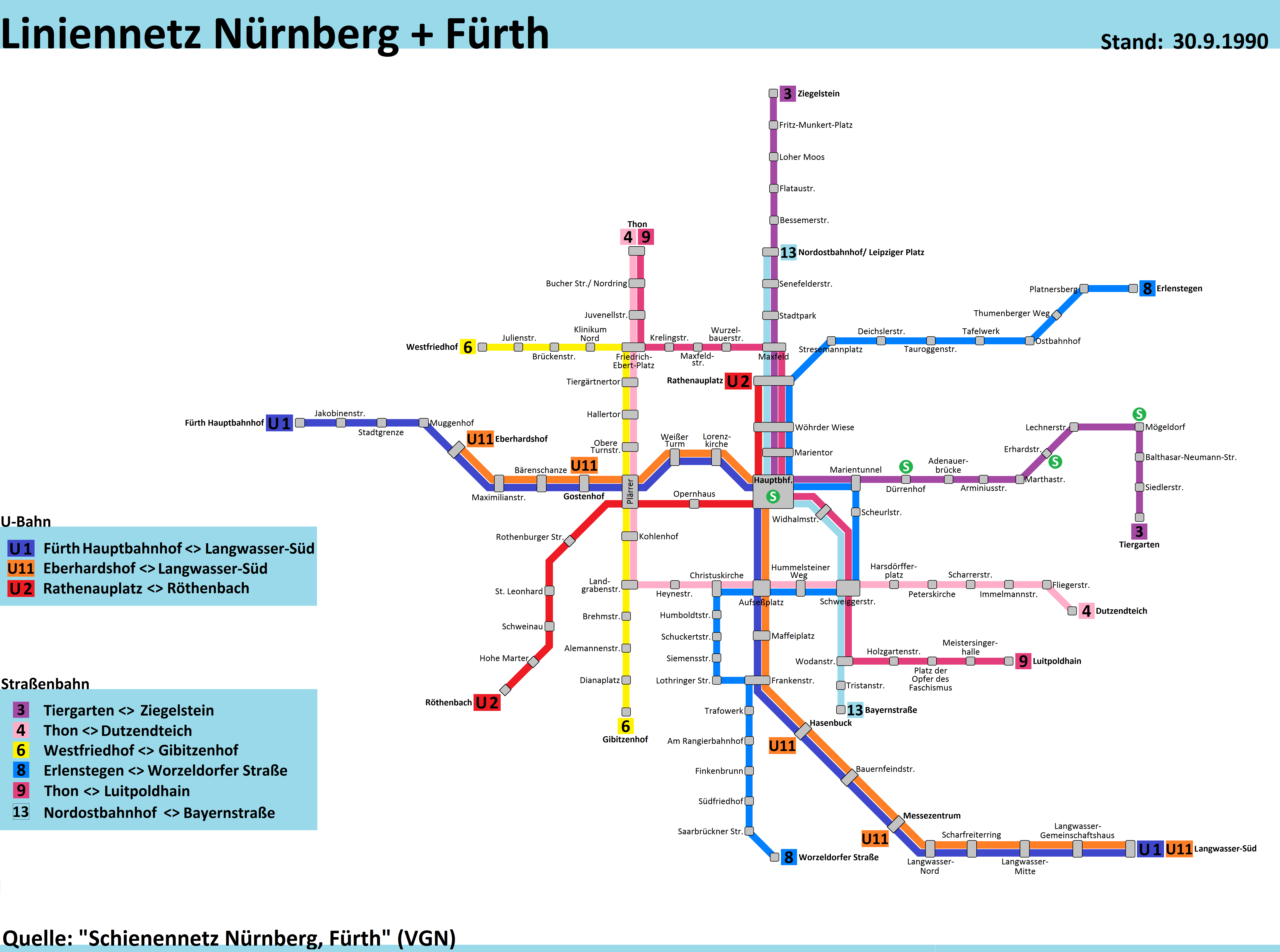 Das Liniennetz der U-Bahn und Straßenbahn in Nürnberg und Fürth vom 30. September 1990. Die relevanten Daten stammen vom "Schienennetz Nürnberg, Fürth", welches vom VGN herausgegeben wurde und ebenfalls vom 30.9.1990 stammt.